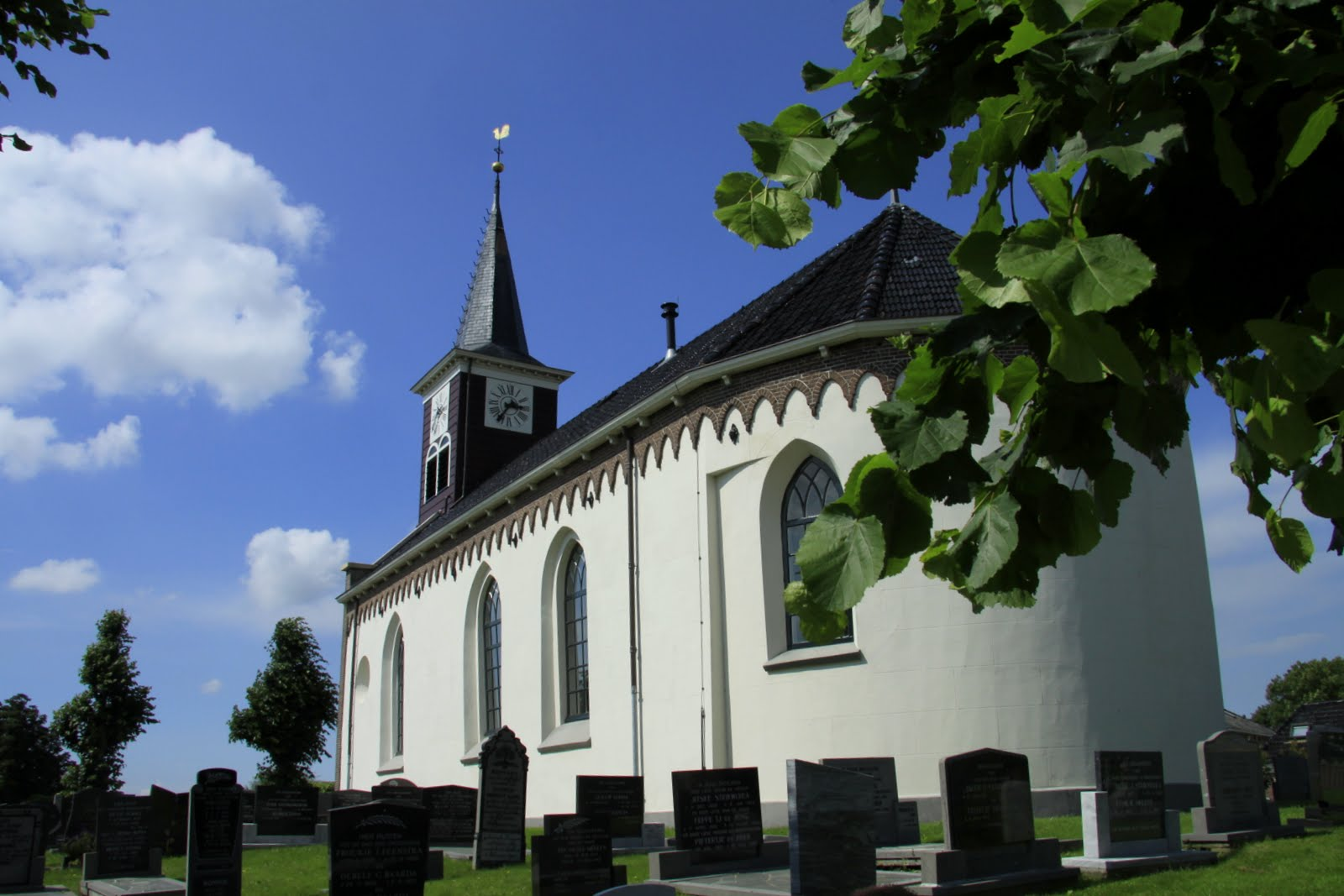 Lollum kerk